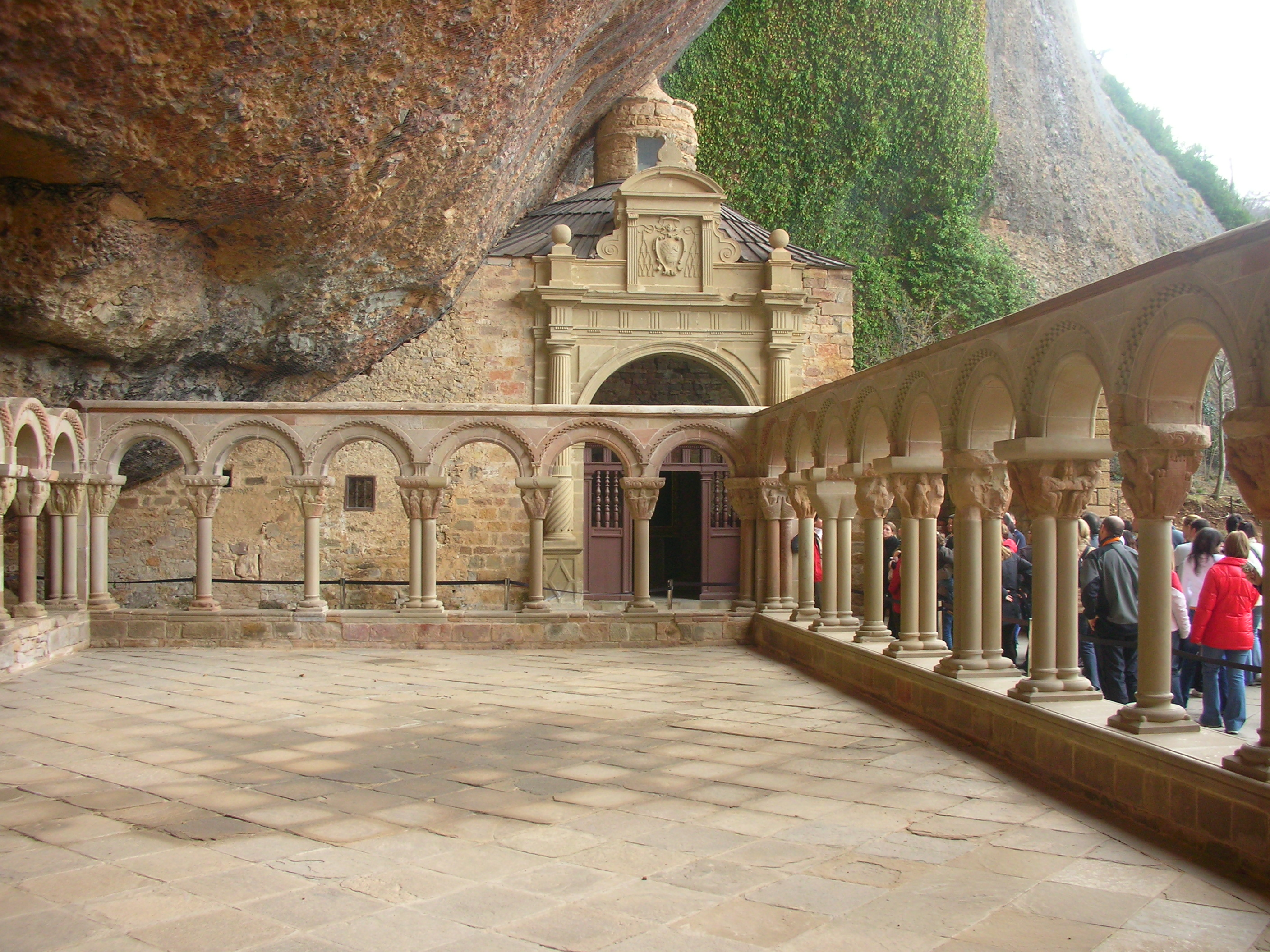 Claustro del Monasterio de San Juan de la Peña